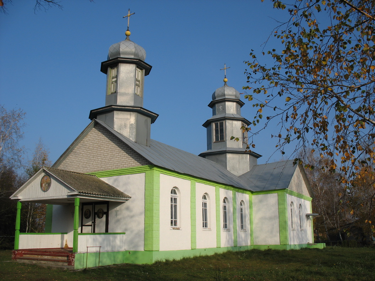 Чернігівська обл., Менський р-н, с. Киселівка. Миколаївська церква, кінець ХХ ст. Архітектурний стиль - московський єпархіальний (синодальний)